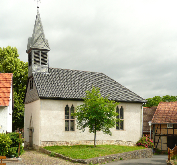 Kirche in Laubach